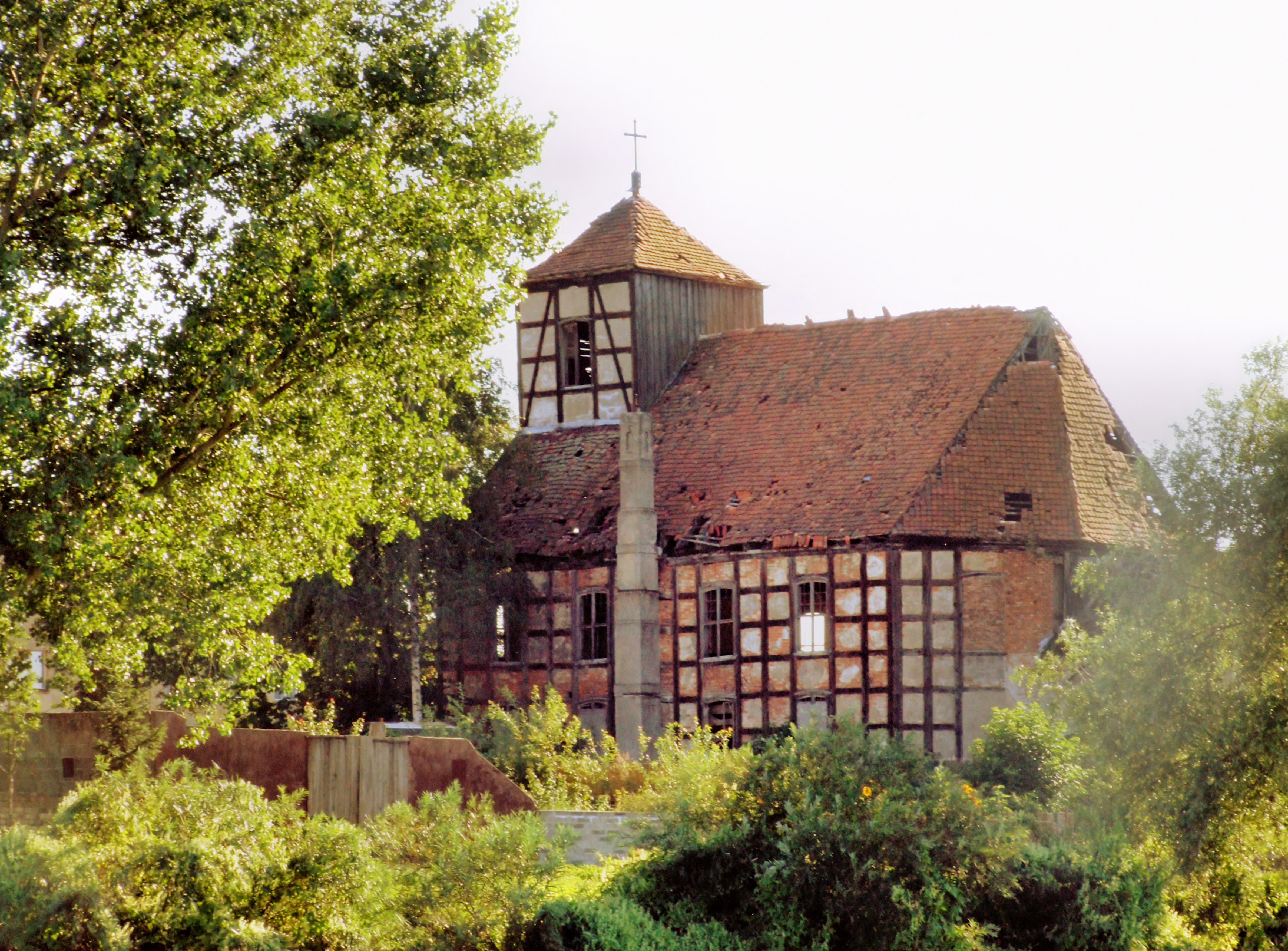 Sieraków, kościół ewangelicki; zdjęcie przedstawia świątynię przed katastrofą, w której runęła pd. część budynku (ta z wieżą)